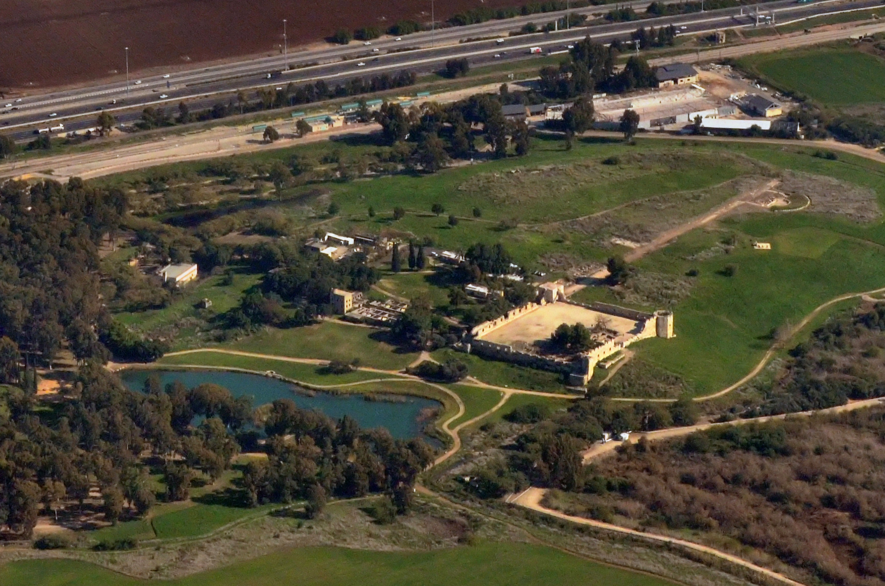 תל אפק